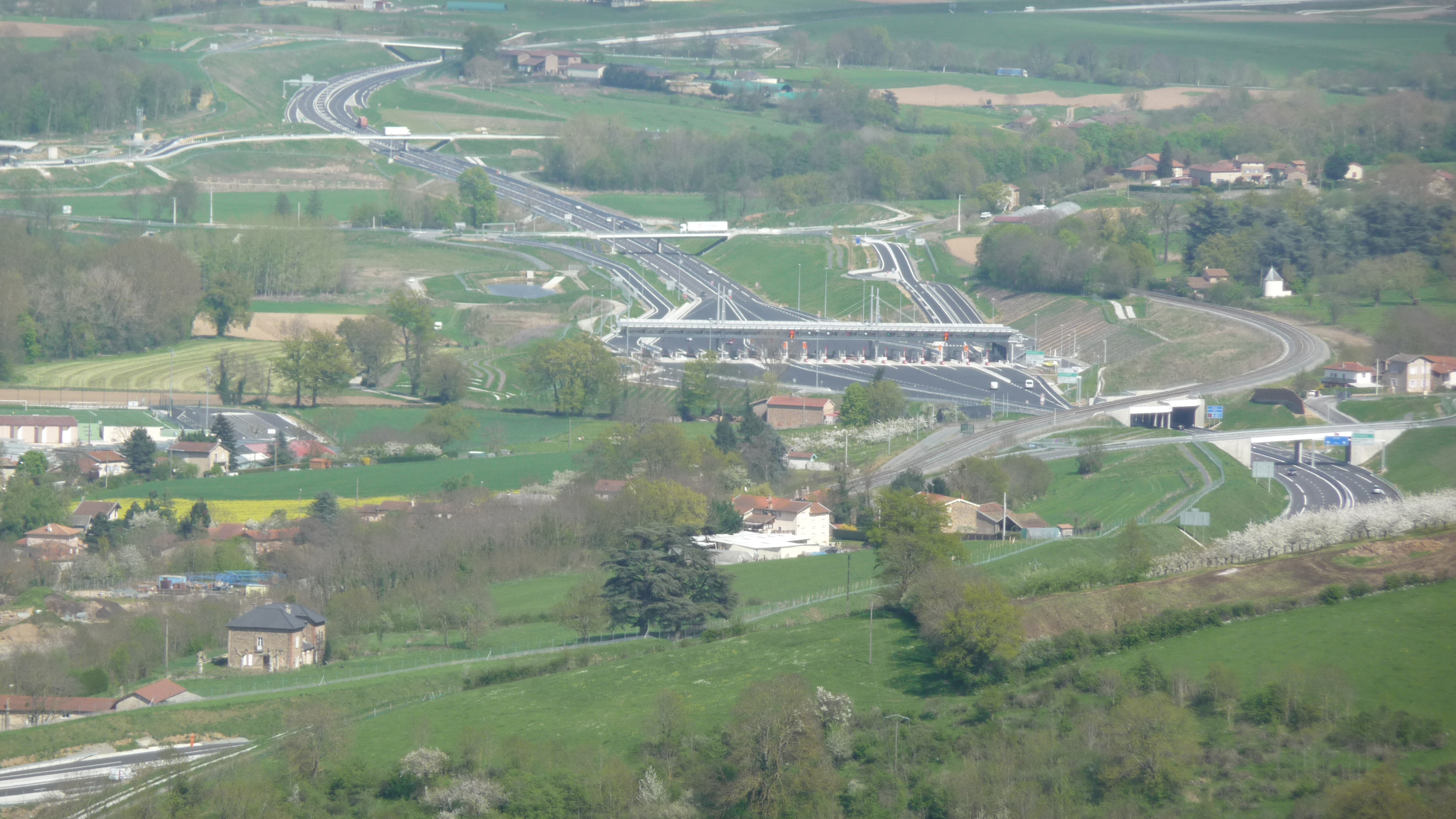 A89 - Barrière de péage de Saint-Romain-De-Popey - Echangeur de Tarare-Est